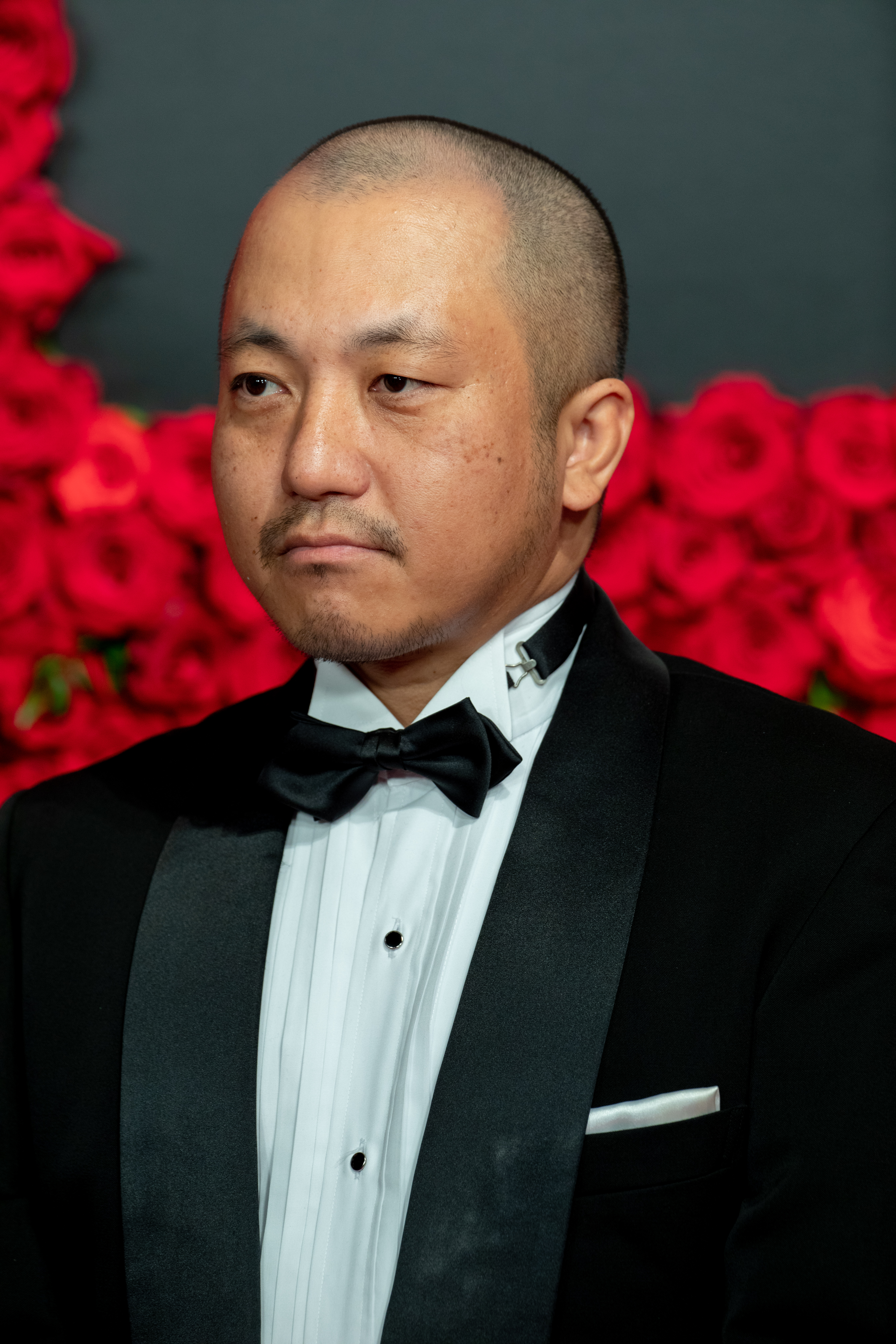 第30回 東京国際映画祭 オープニングセレモニー 白石和彌 (映画俳優 役所広司)